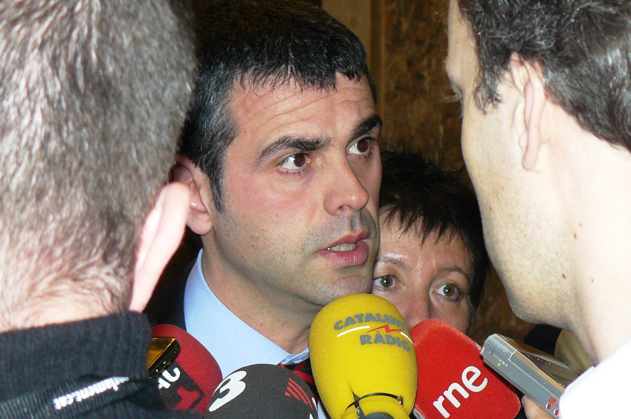 Santi Vila fent declaracions a passos perduts al Parlament